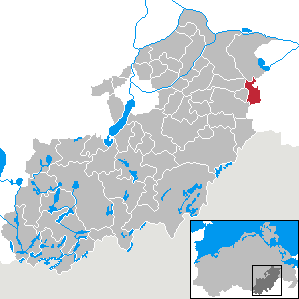 Schönhausen in Mecklenburg-Vorpommern, Landkreis Mecklenburg-Strelitz